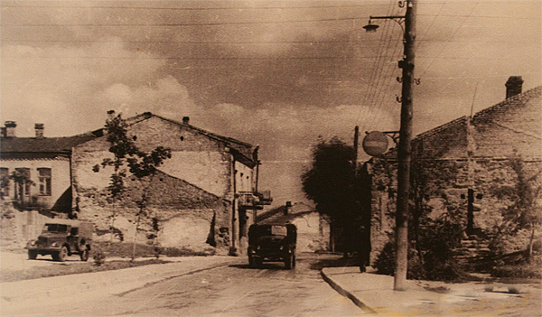 Drahomanov street